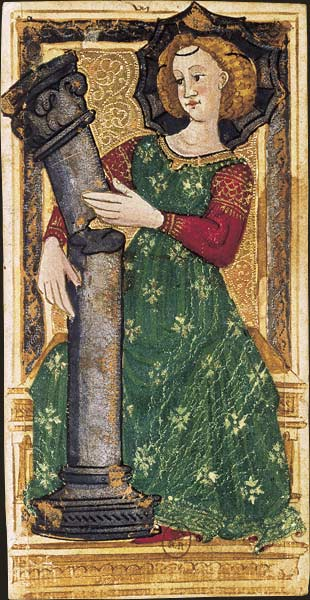 Charles VI (or Gringonneur) Deck; Le tarot dit de Charles VI